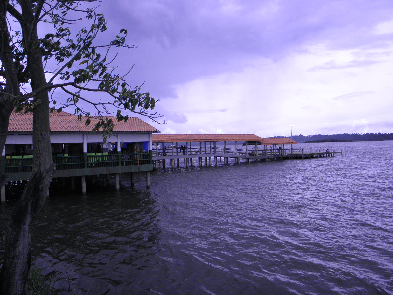 Terminal Hidroviario (2) de Itaituba